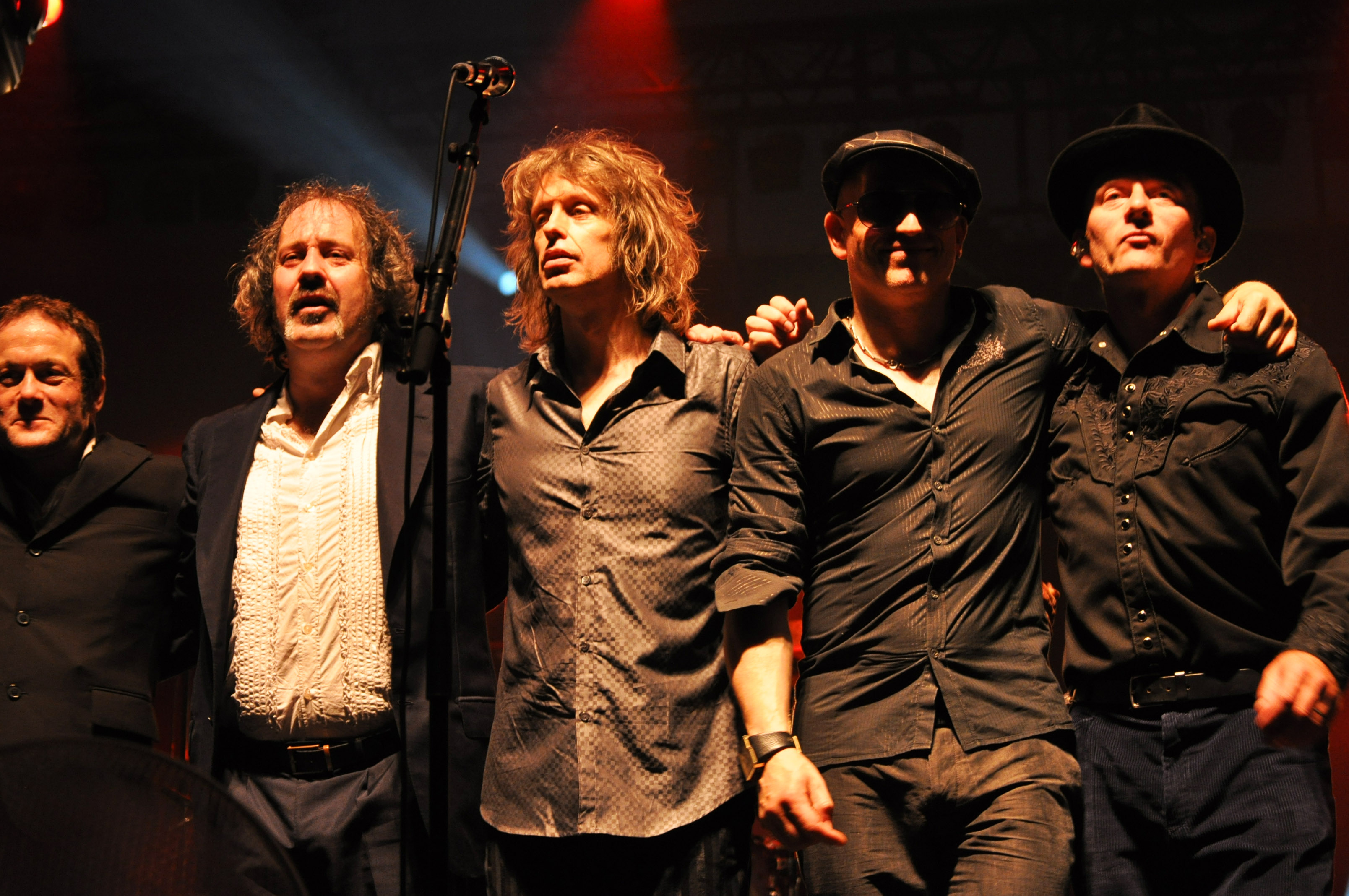 Steve Wickham avec The Waterboys à Lorient en 2011.